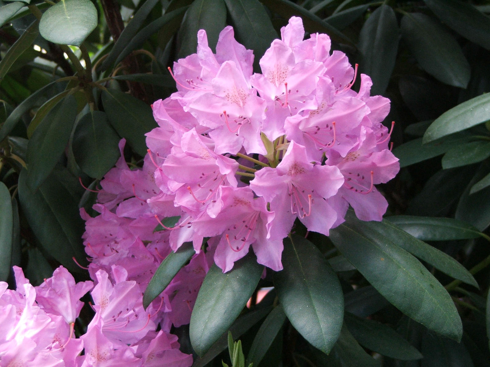 Rhododendron catawbiense